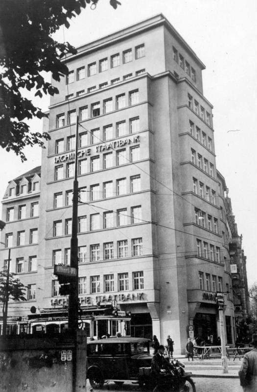 Scherl: Was gibt es neues in Dresden? Auch Dresden baut Hochhäuser. Das neue Hochhaus der Sächsischen Staatsbank. um 1930